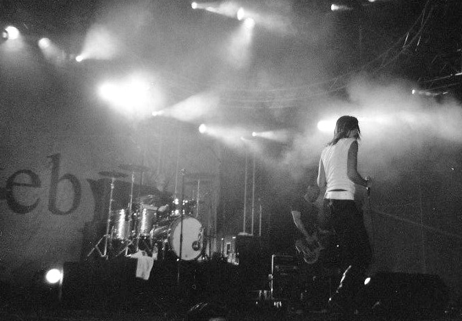 Briskebys Lise Karlsnes på scenen under Roskilde-festivalen i Danmark i 2001.